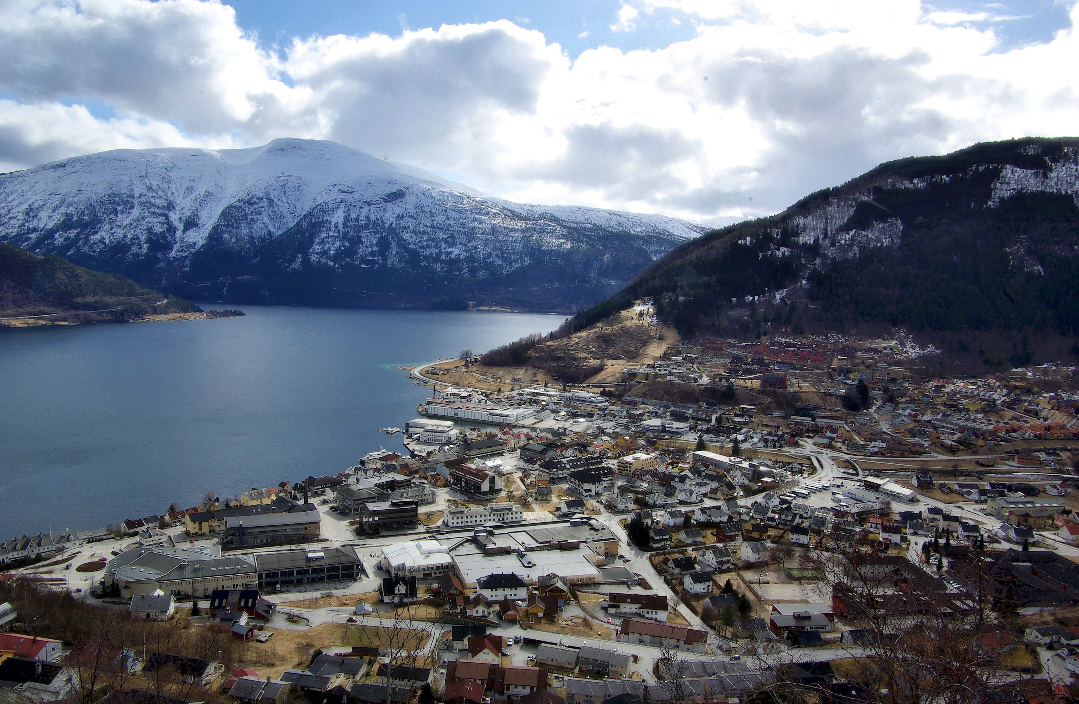 Sogndal sentrum sett frå Åberge.